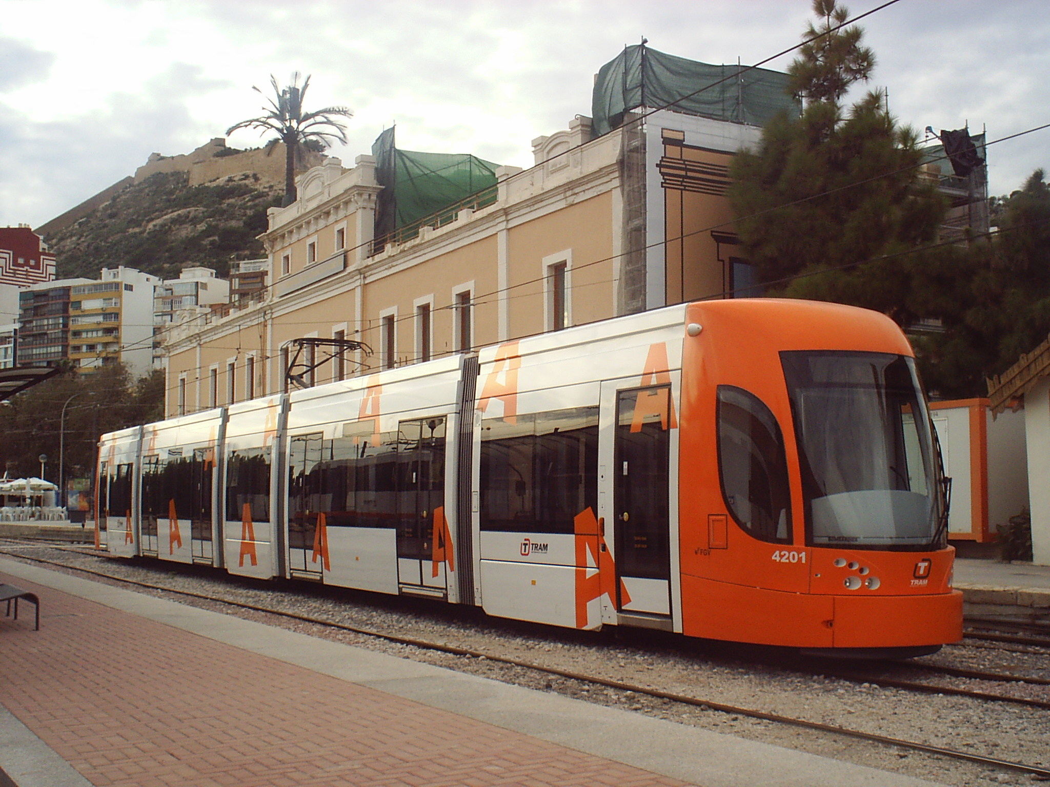 Tranvia Bombardier que presta servicio en las lineas 3, 4 y 4L, en la estacion de La Marina.